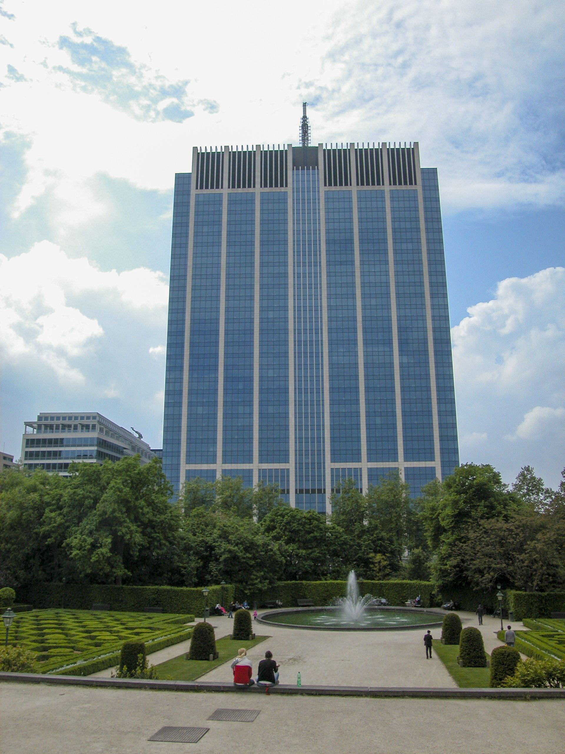 Saint-Josse-ten-Noode, Belgium